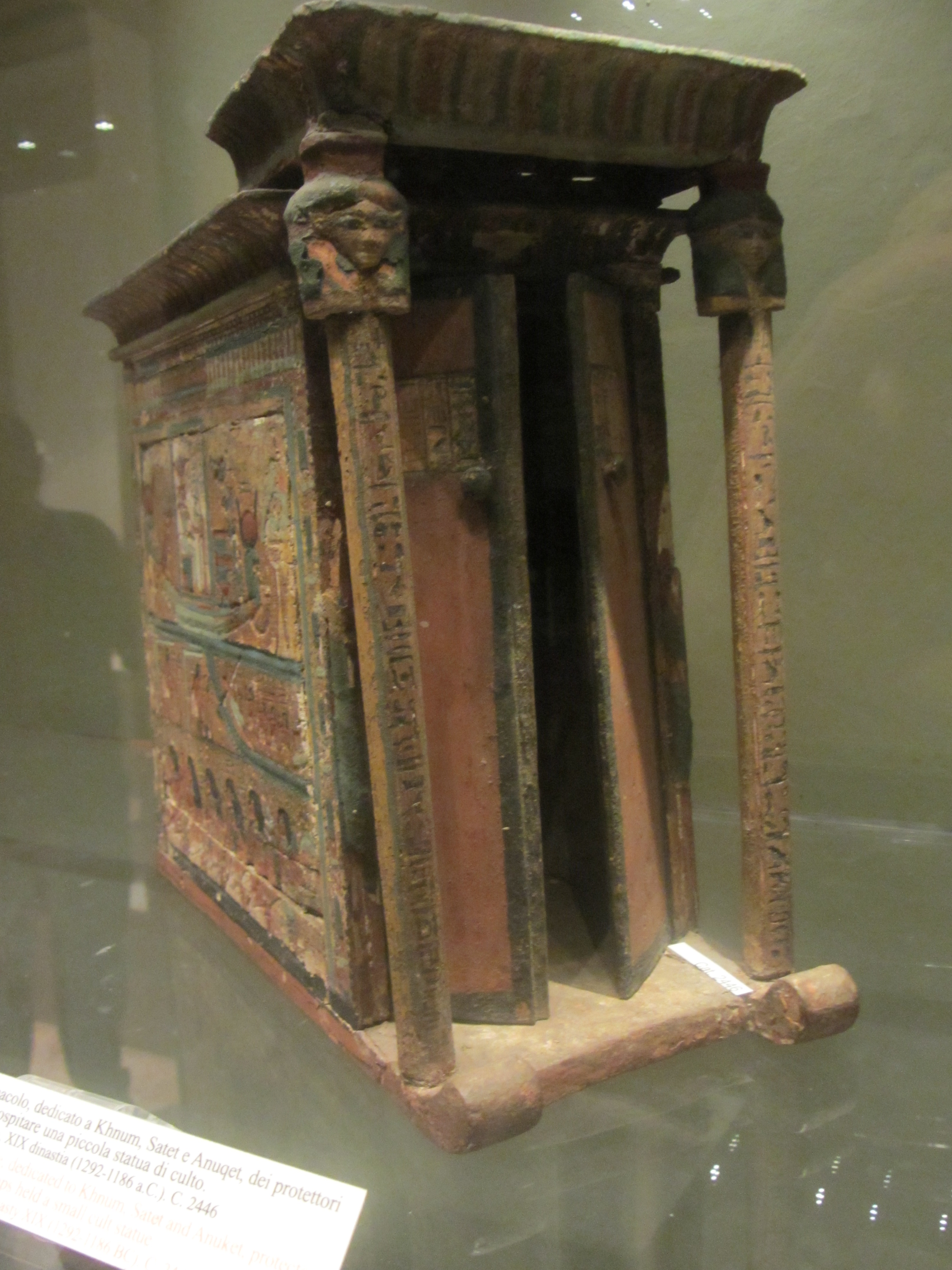 manufatto in legno che può ospitare un piccolo oggetto di culto ( di solito una statua )